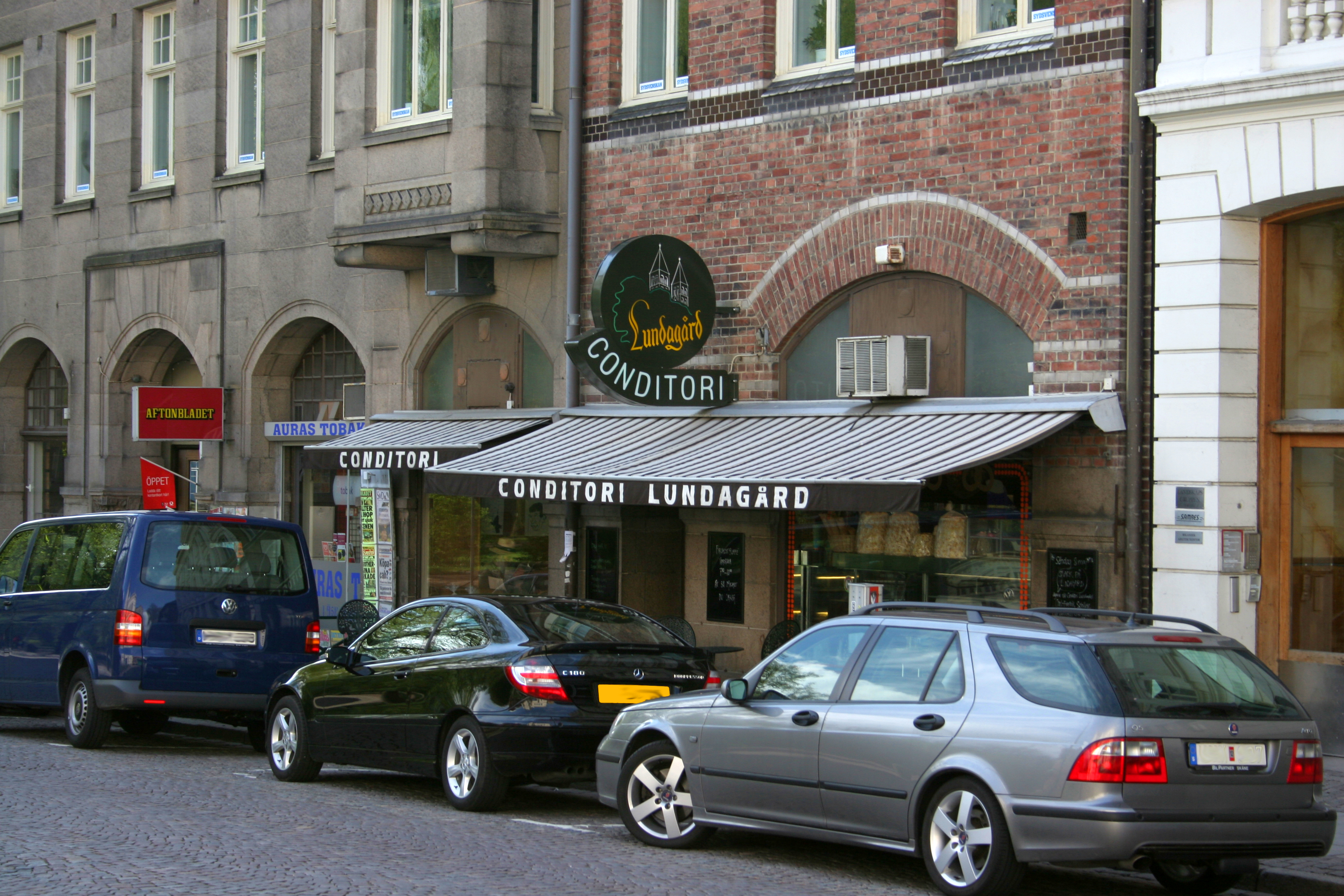 Conditori Lundagård, Lund, Sweden.